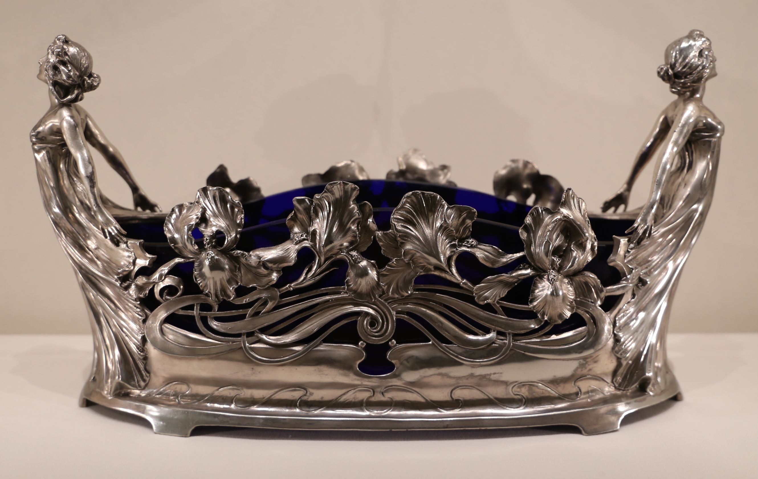 Miramare This is a photo of a monument which is part of cultural heritage of Italy. The authorisation for taking photos of this object was provided by the World Wide Fund for Nature Italy.